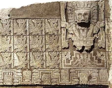 Puerta del Sol, detalle. Tihuanacu, primeras excavaciones